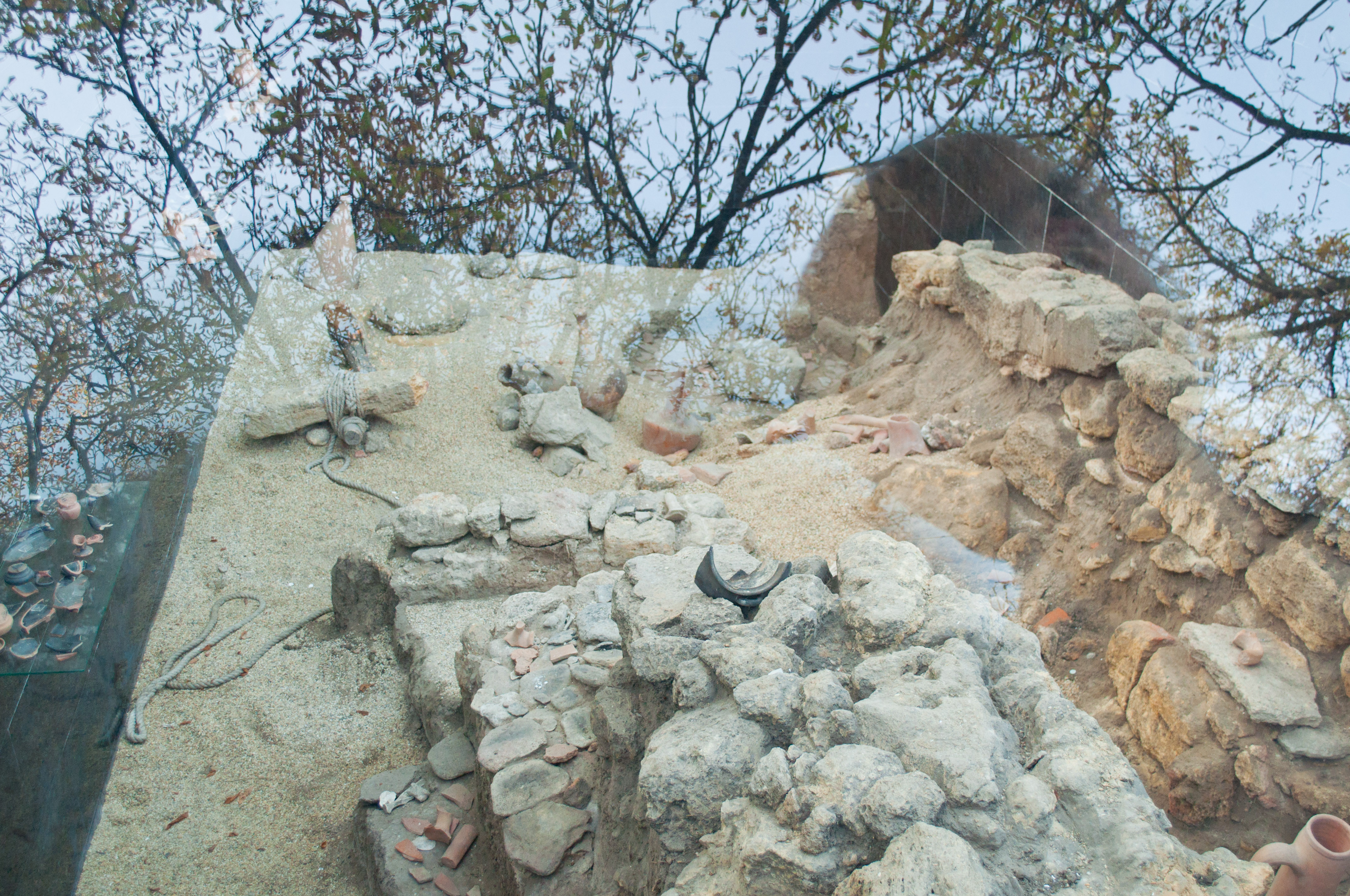 Поселення та некрополь античного часу